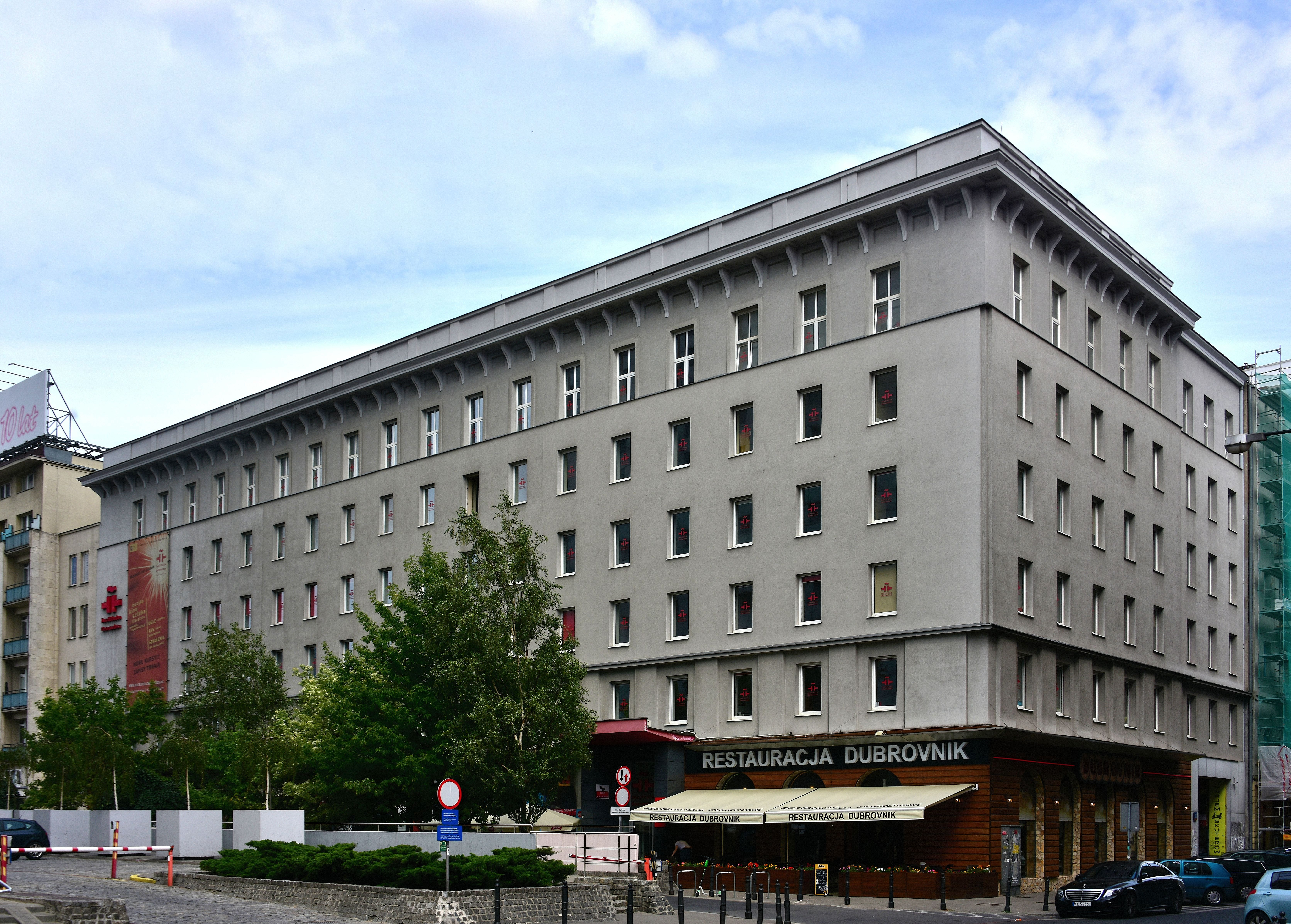 Instytut Cervantesa przy ul. Nowogrodzkiej 22 w Warszawie